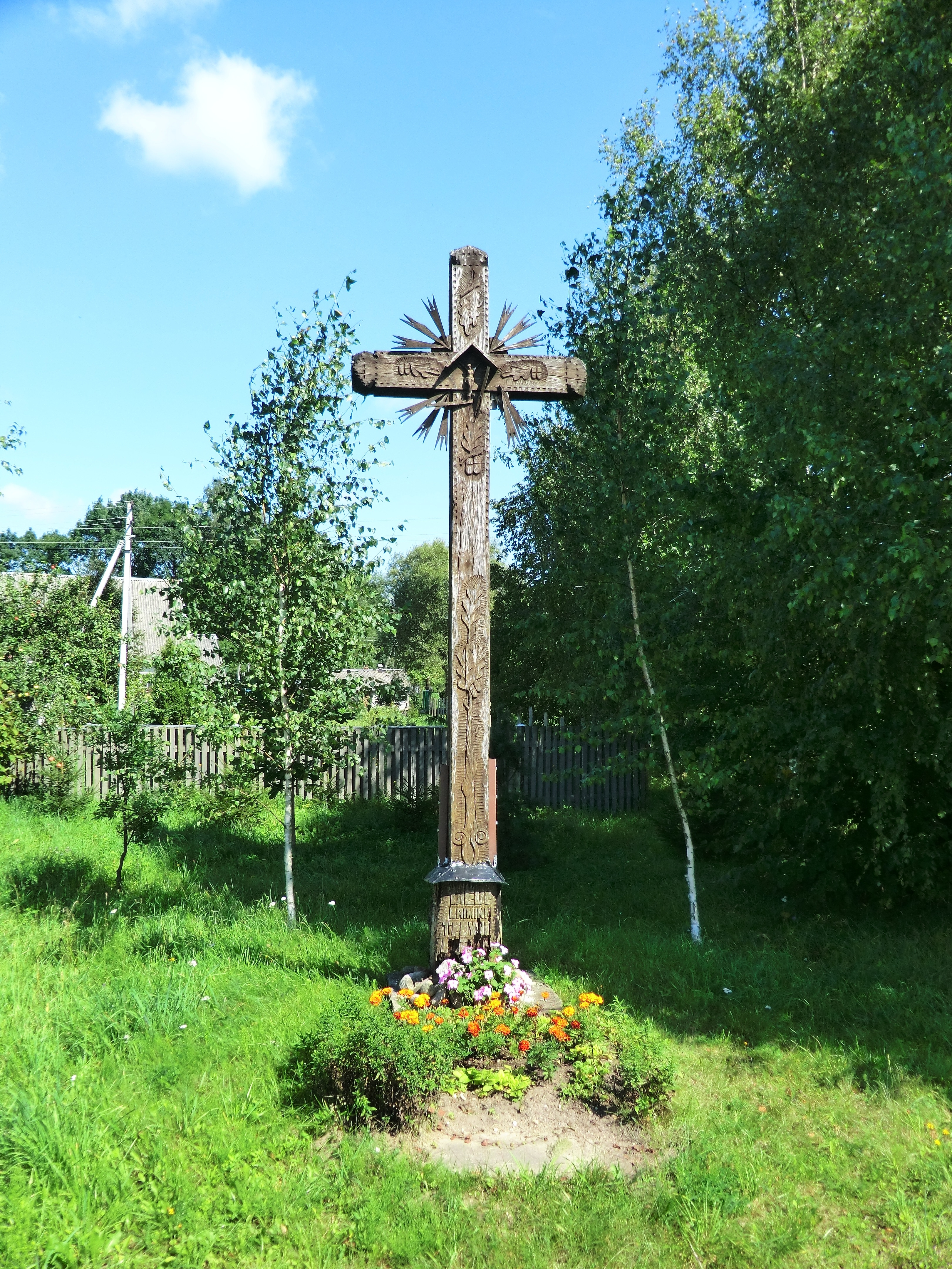 Pyragiai, Lithuania